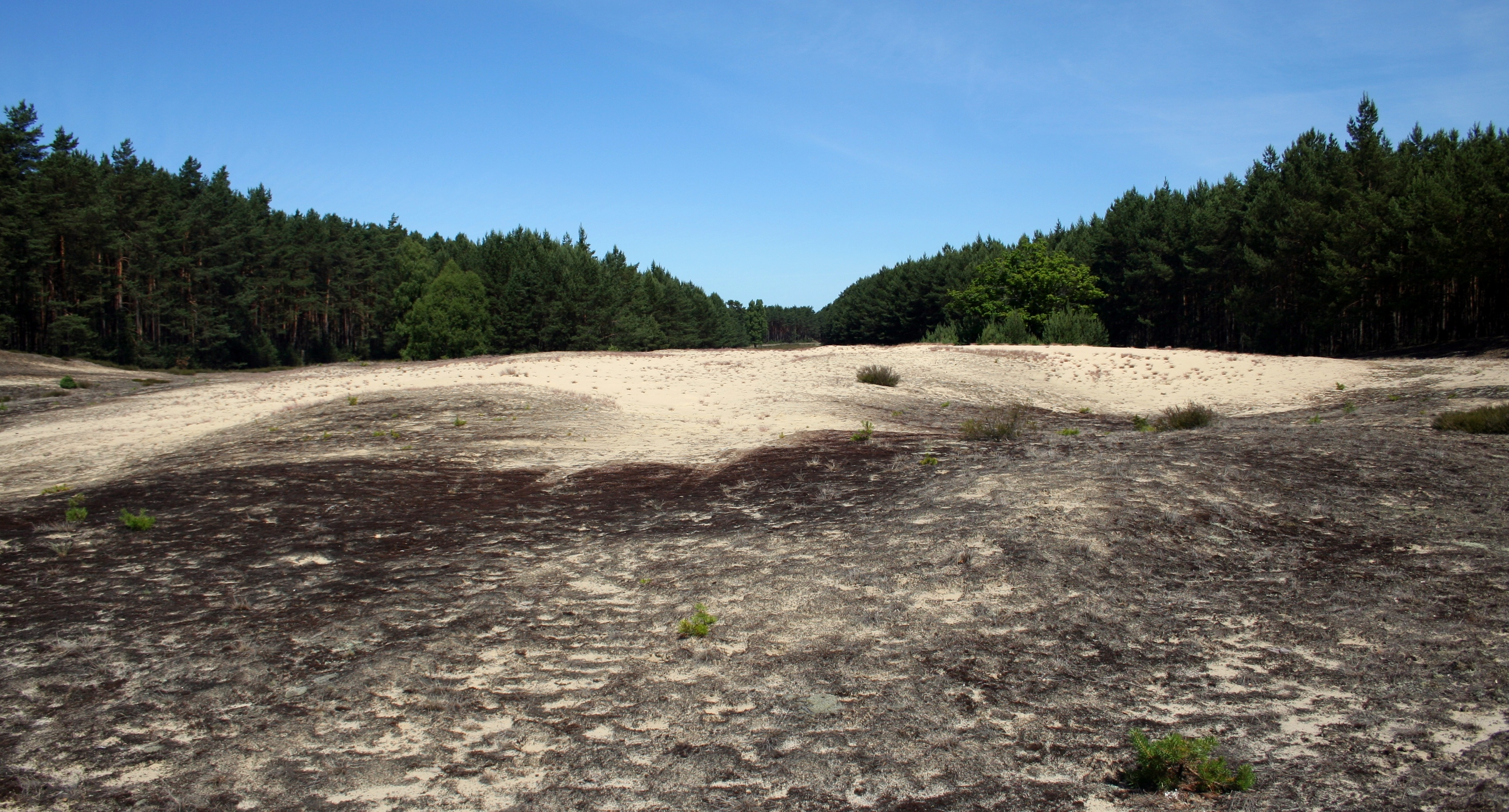 Park Narodowy Bory Tucholskie, wydma (pas przeciwpożarowy)